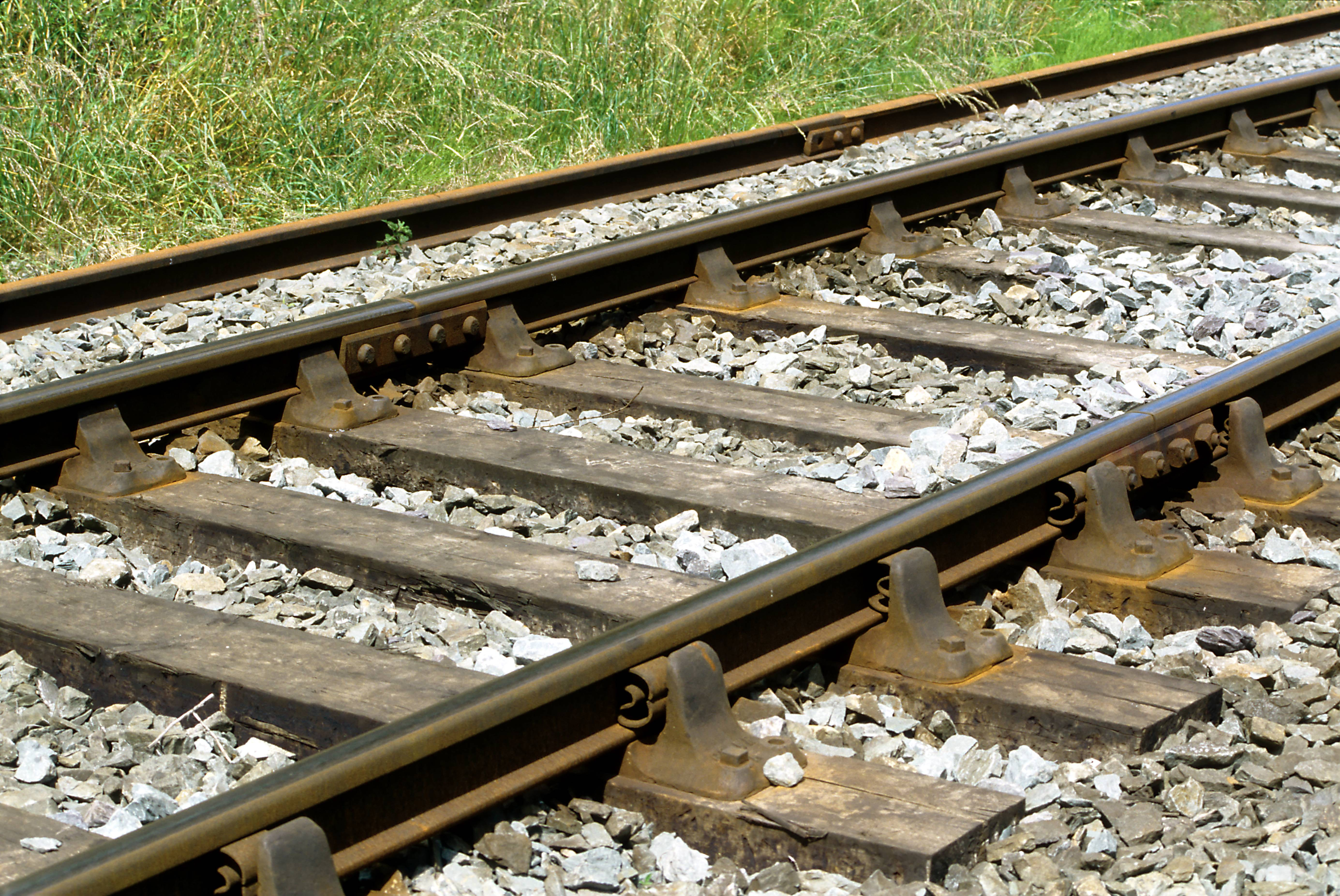 altbritischer Stuhlschienenoberbau, an Stelle der Holzkeile werden seit längerem Stahlfederklemmen verwendet. Die Schienen sind mit unterschiedlichen Köpfen nicht mehr wendbar. Bei Killarney, Irland